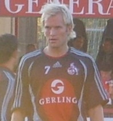 Pekka Lagerblom, 1. FC Köln